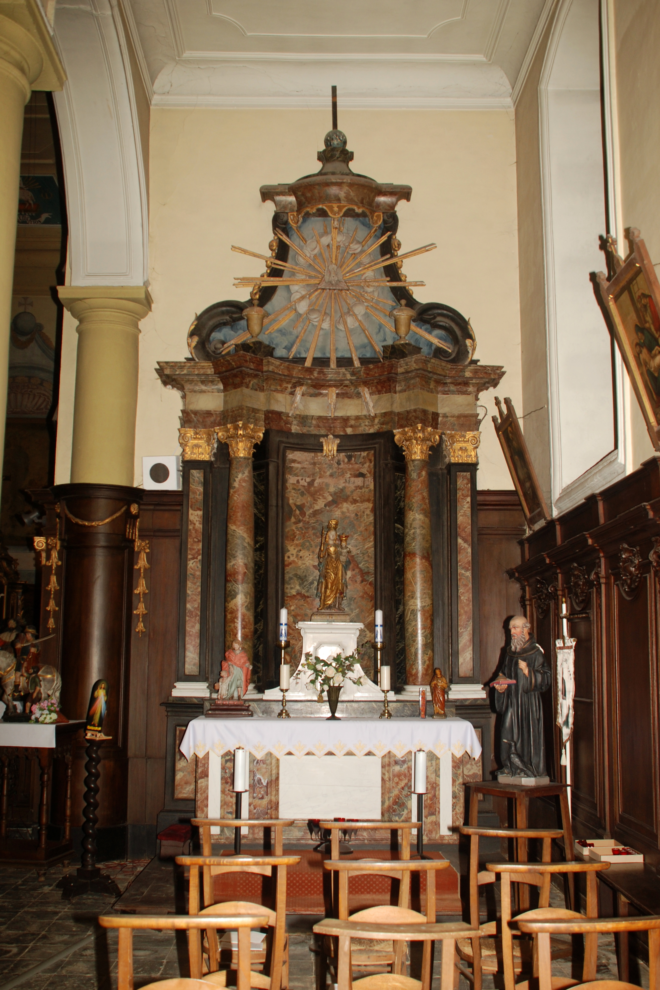 Belgique - Brabant wallon - Église Saint-Martin de Ways